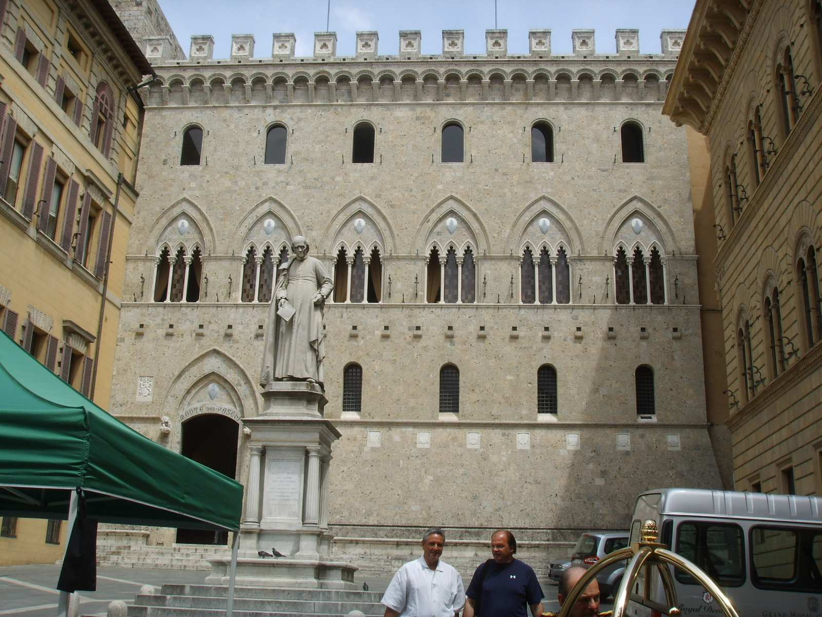 Palazzo del Monte dei Paschi (Siena).